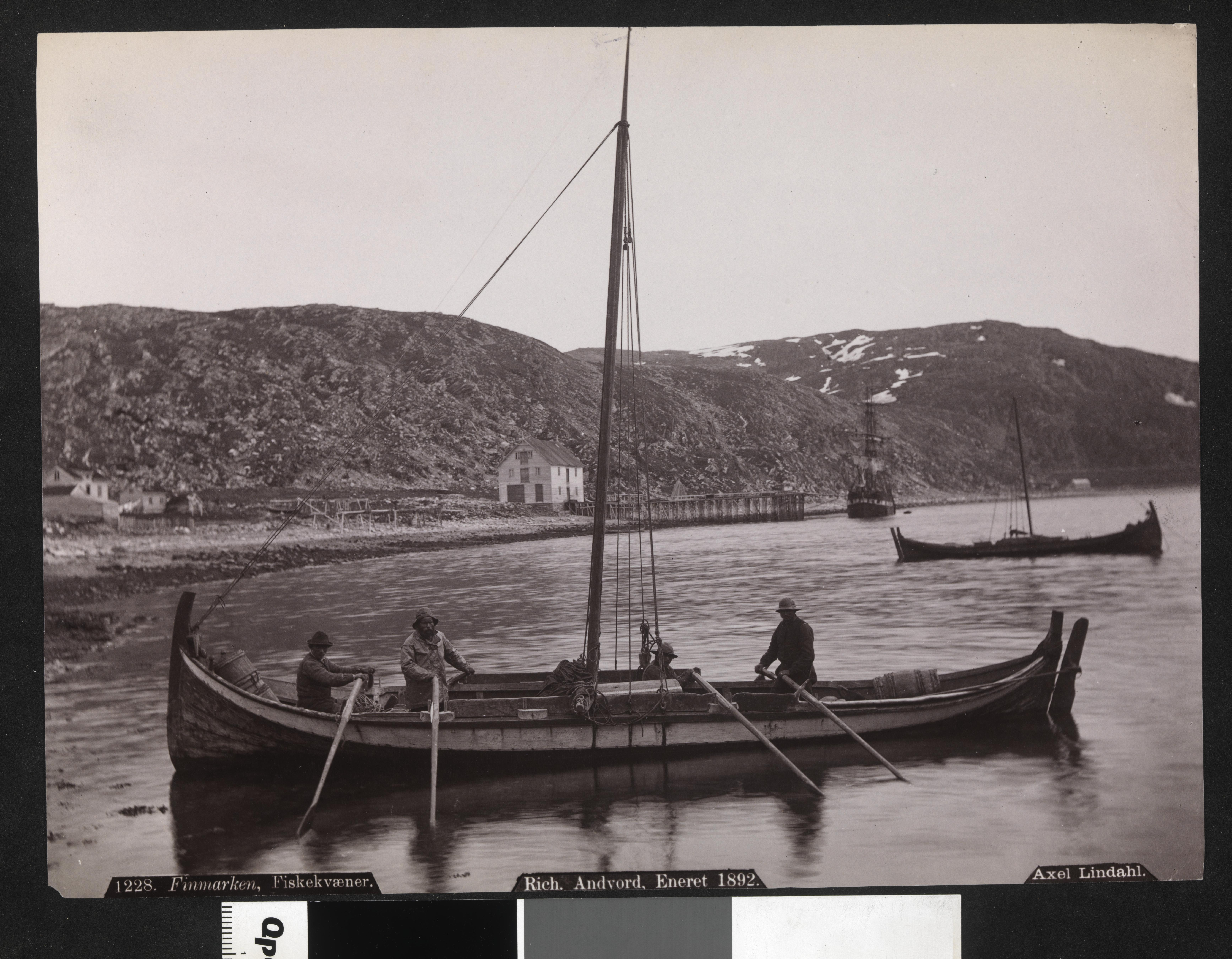 Bildet er hentet fra Nasjonalbibliotekets bildesamling Finnmark